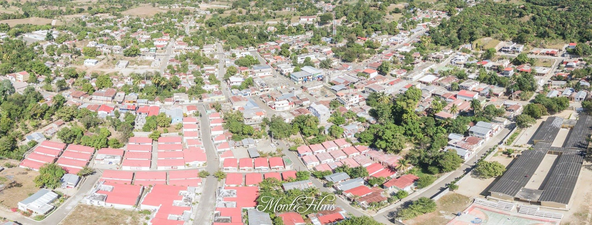 la hermosa ciudad de villa los almacigos, hermoso por sus bellos rios y arroyos, gente solidaria y trabajadora, comunidad ejemplar